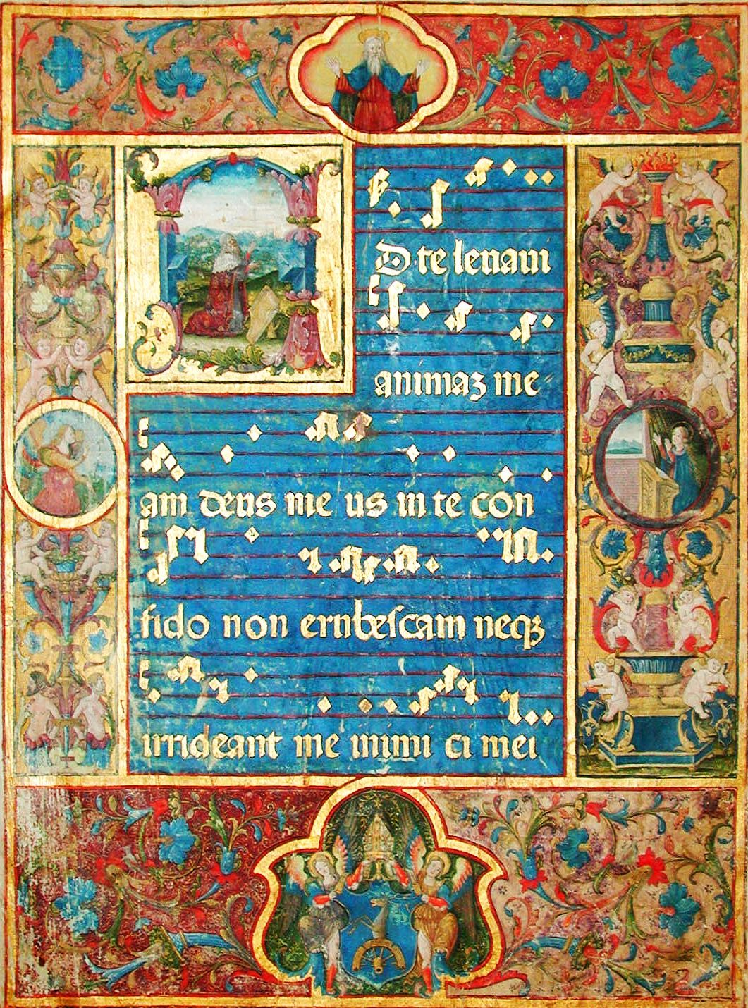 A Bakócz-graduálé címlapja, alul a Bakócz-Erdődy címer a bíborosi jelvények nélkül